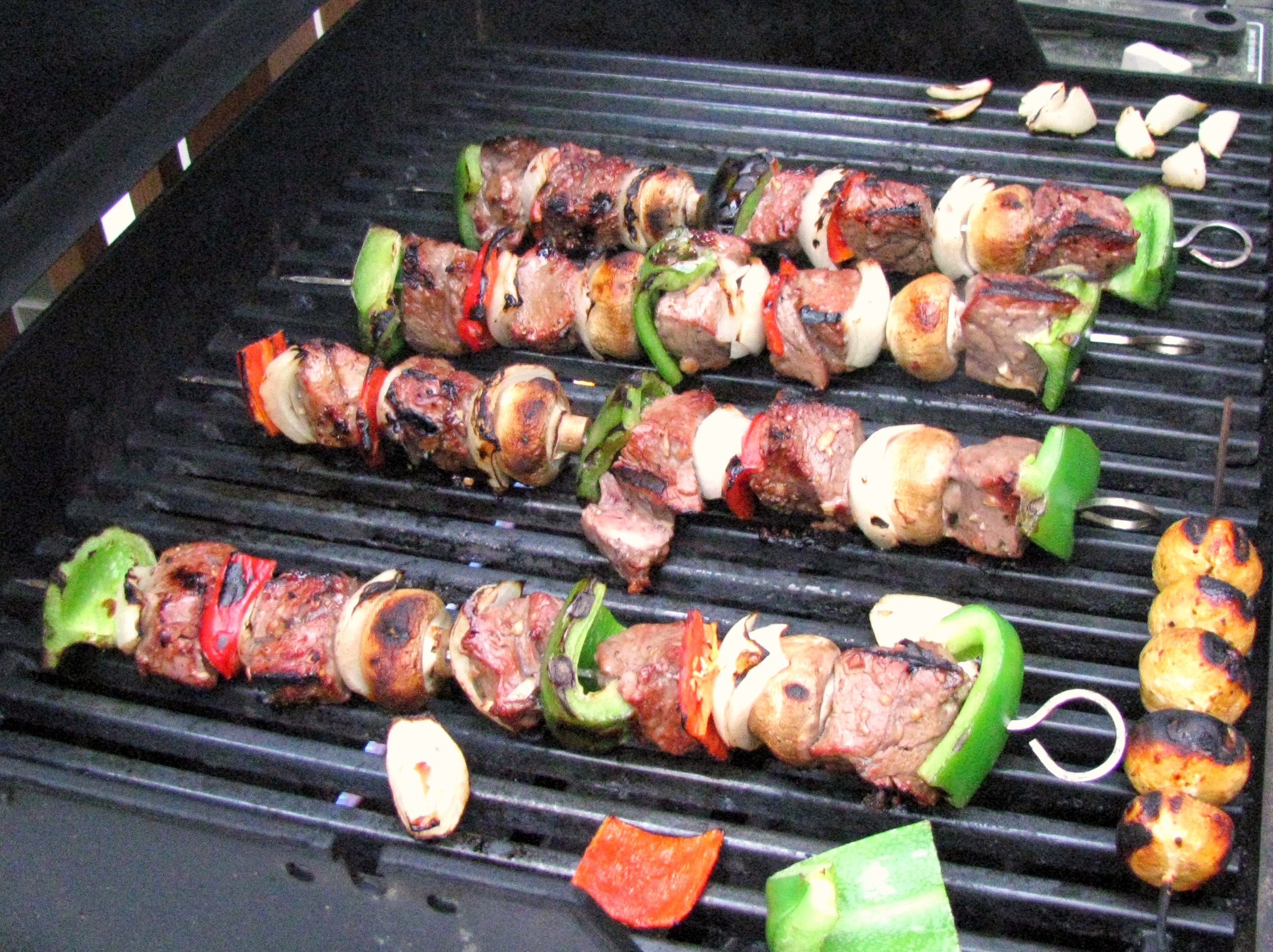 Shish kabob